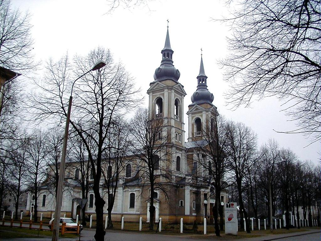 Rīga, Sv. Alberta katoļu baznīca 2002-11-16